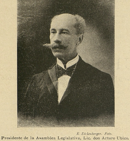 Licenciado Arturo Ubico en 1906. Fotografía de Enrique Eichenberg publicada en "La Locomotora".